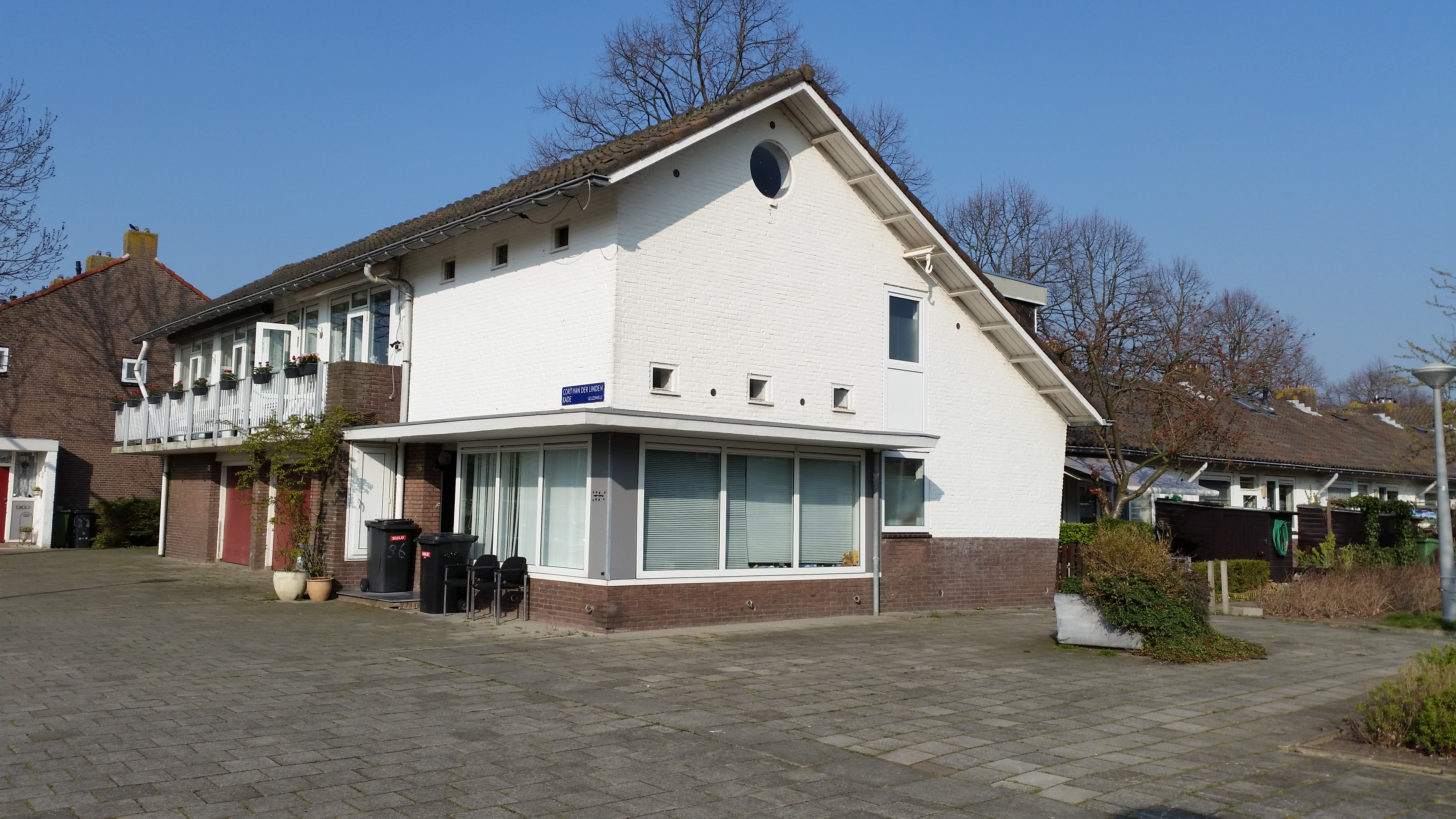 Cort van der Lindenkade 96-102, Amsterdam van Willem Dudok